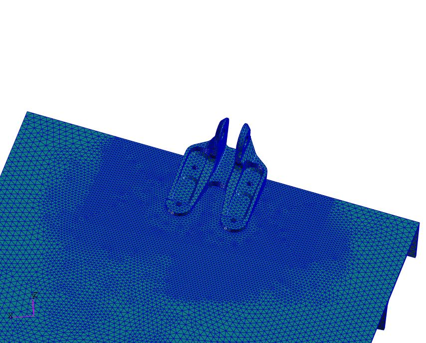 Modelo de elementos finitos de Nastran. Visualizado con Patran